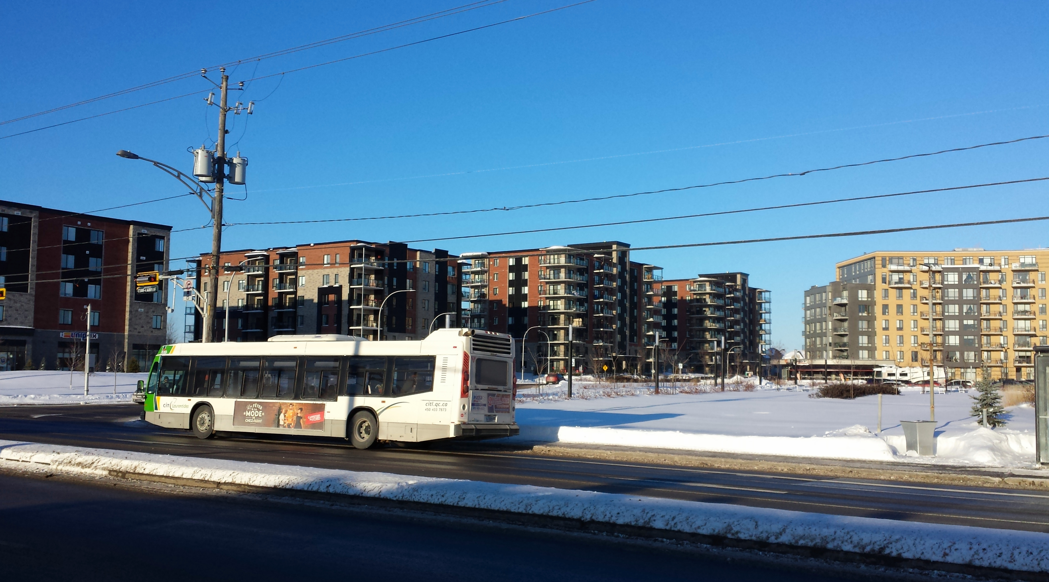 Blainville, Quebec, Canada